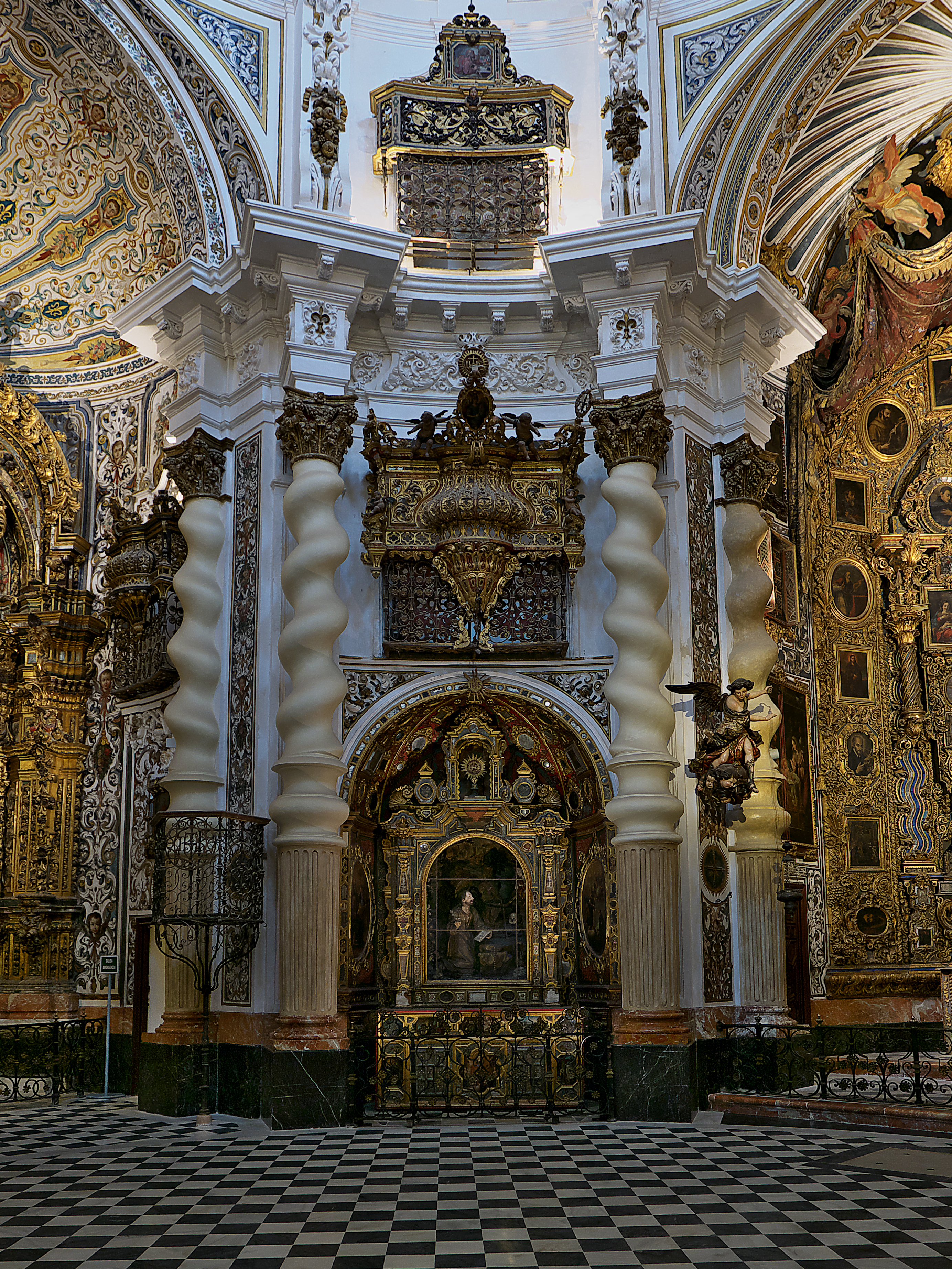 Machón con el retablo de San Ignacio de Loyola.